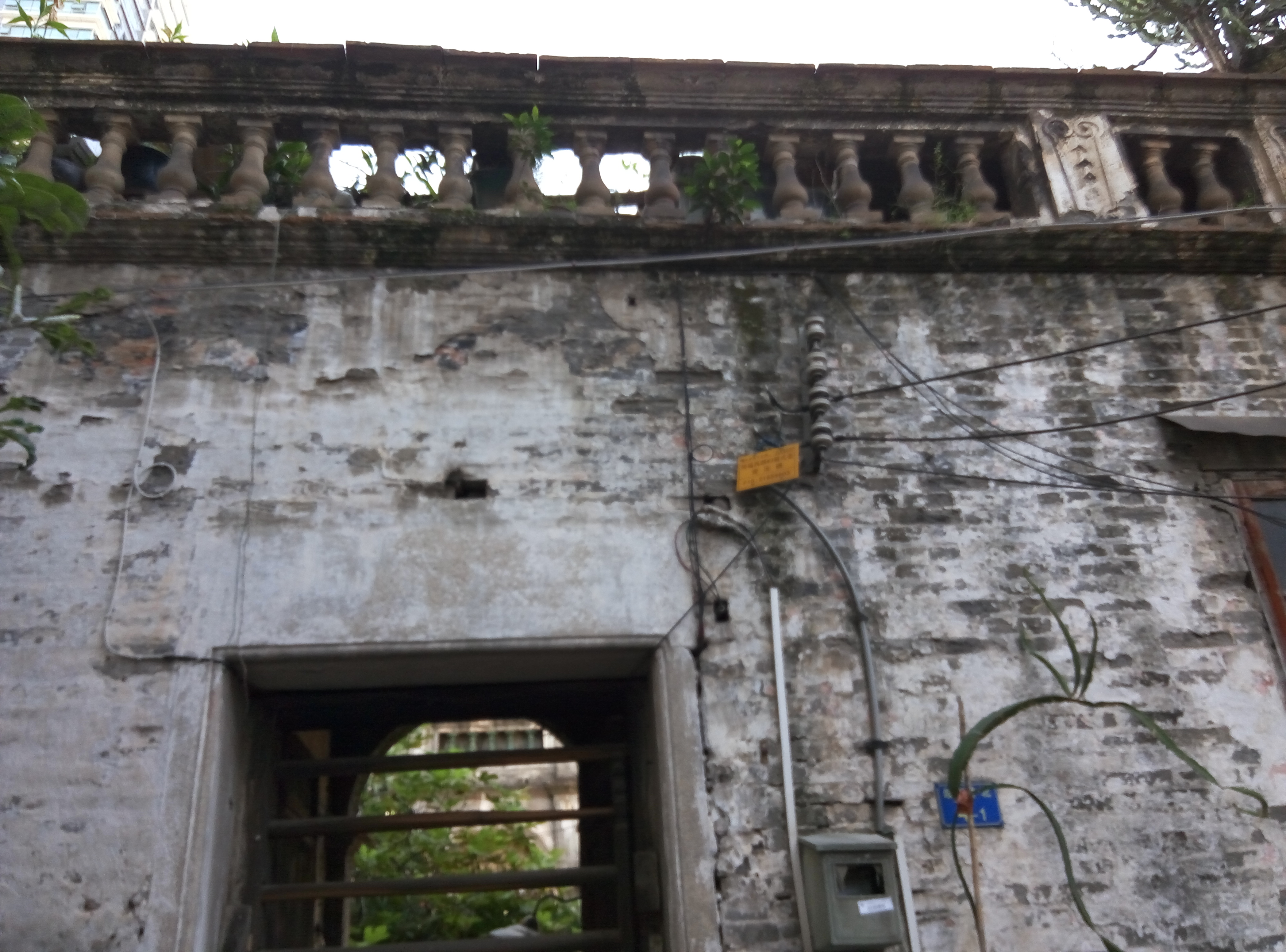 粵語: 廣州 羅明燏故居